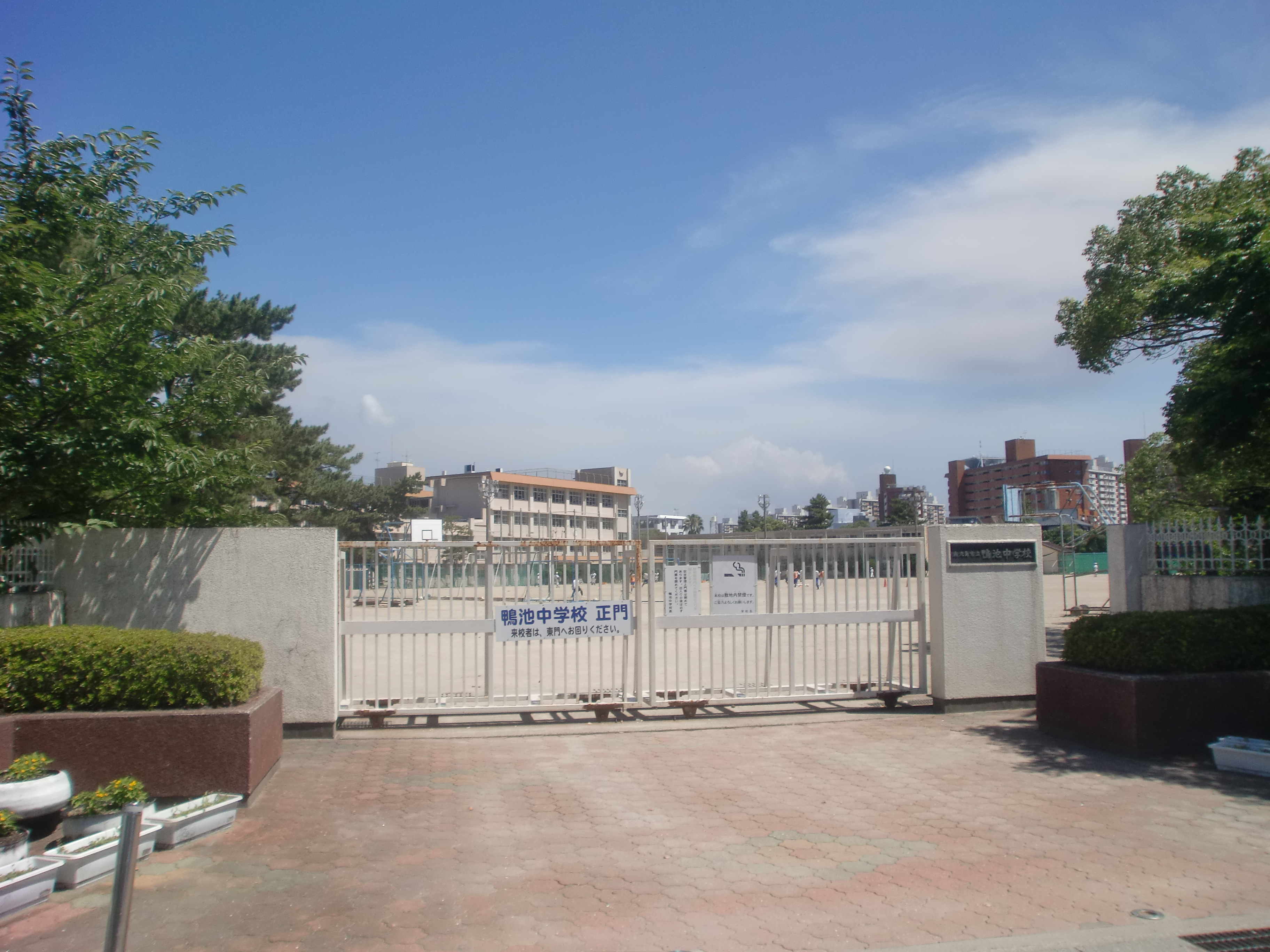 鹿児島市立鴨池中学校の外観。